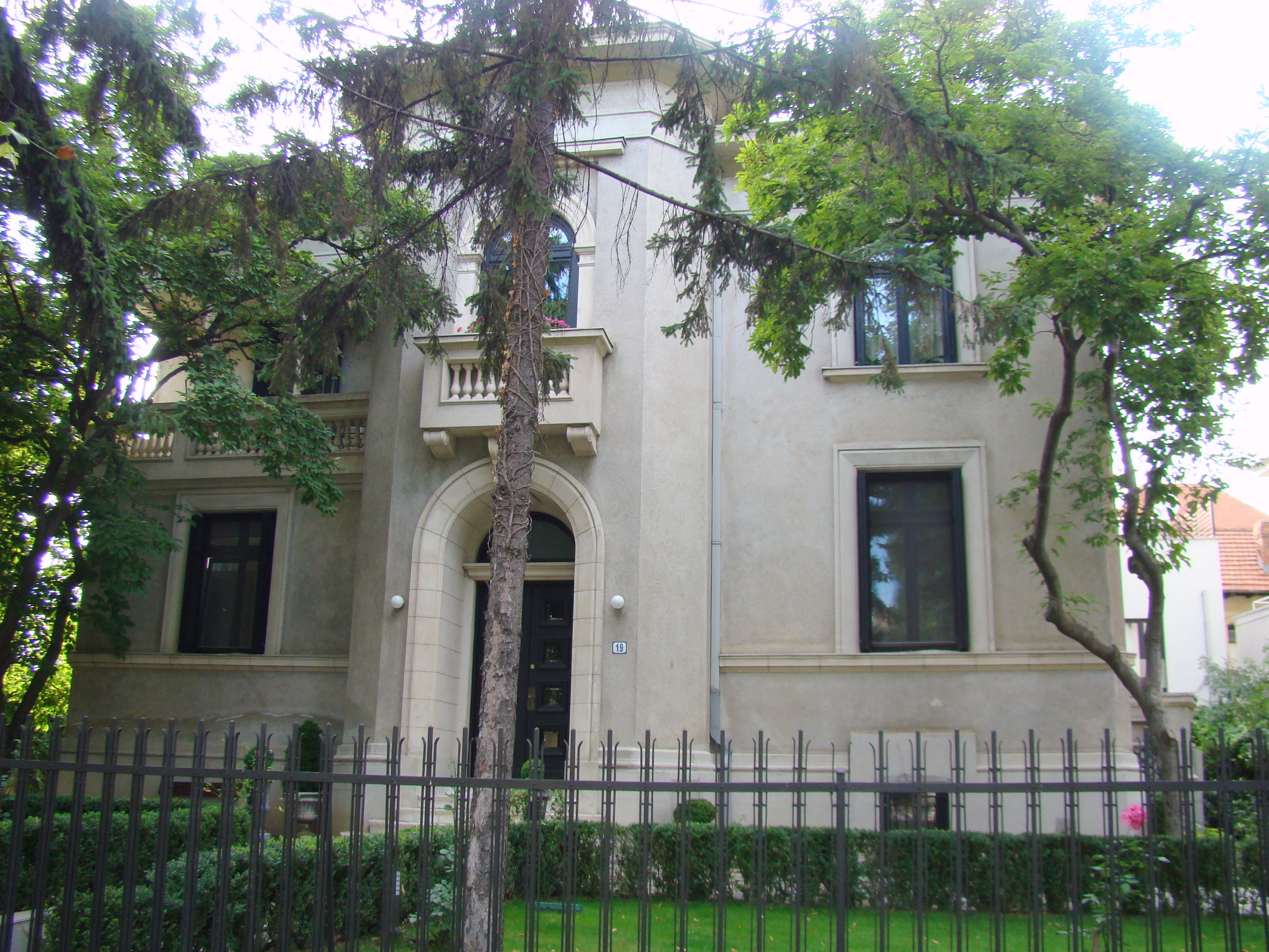 Casă monument istoric, str. Aleea Alexandru, nr. 19